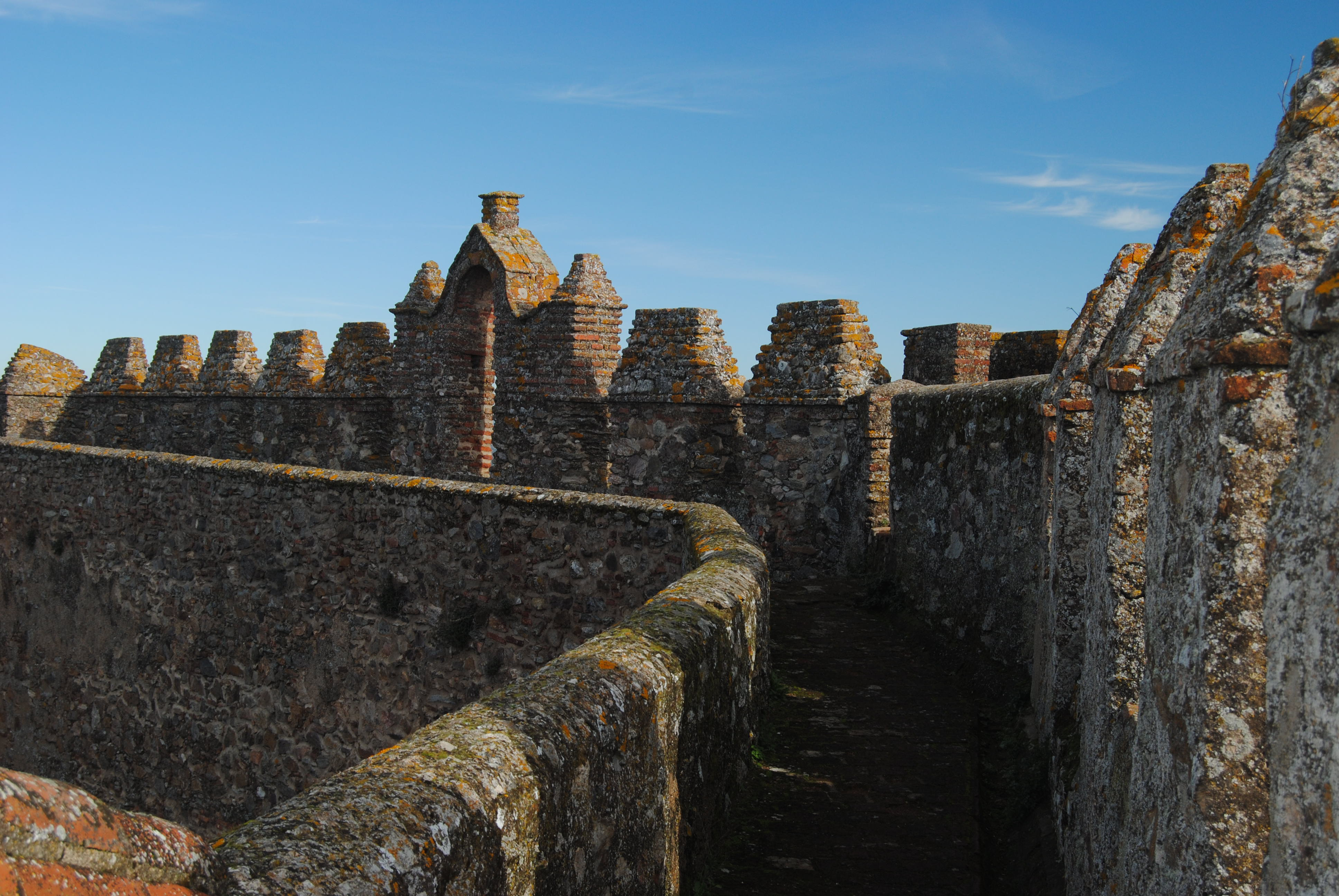 Segura de León, provincia de Badajoz, Extremadura, España.